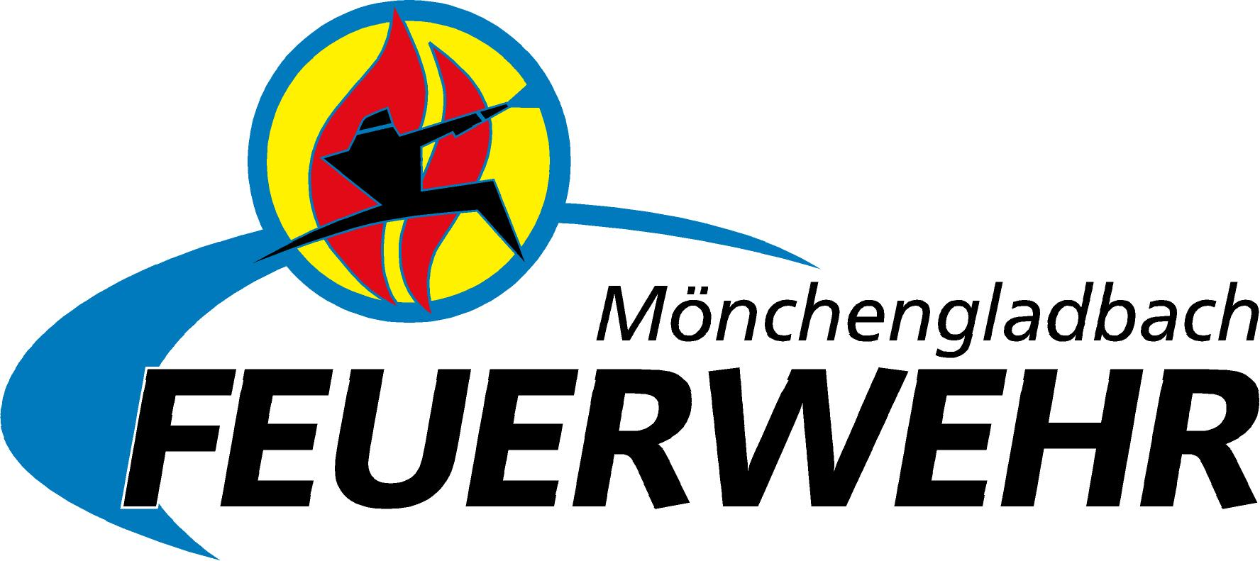 "Firefighter" das Logo der #FWMG